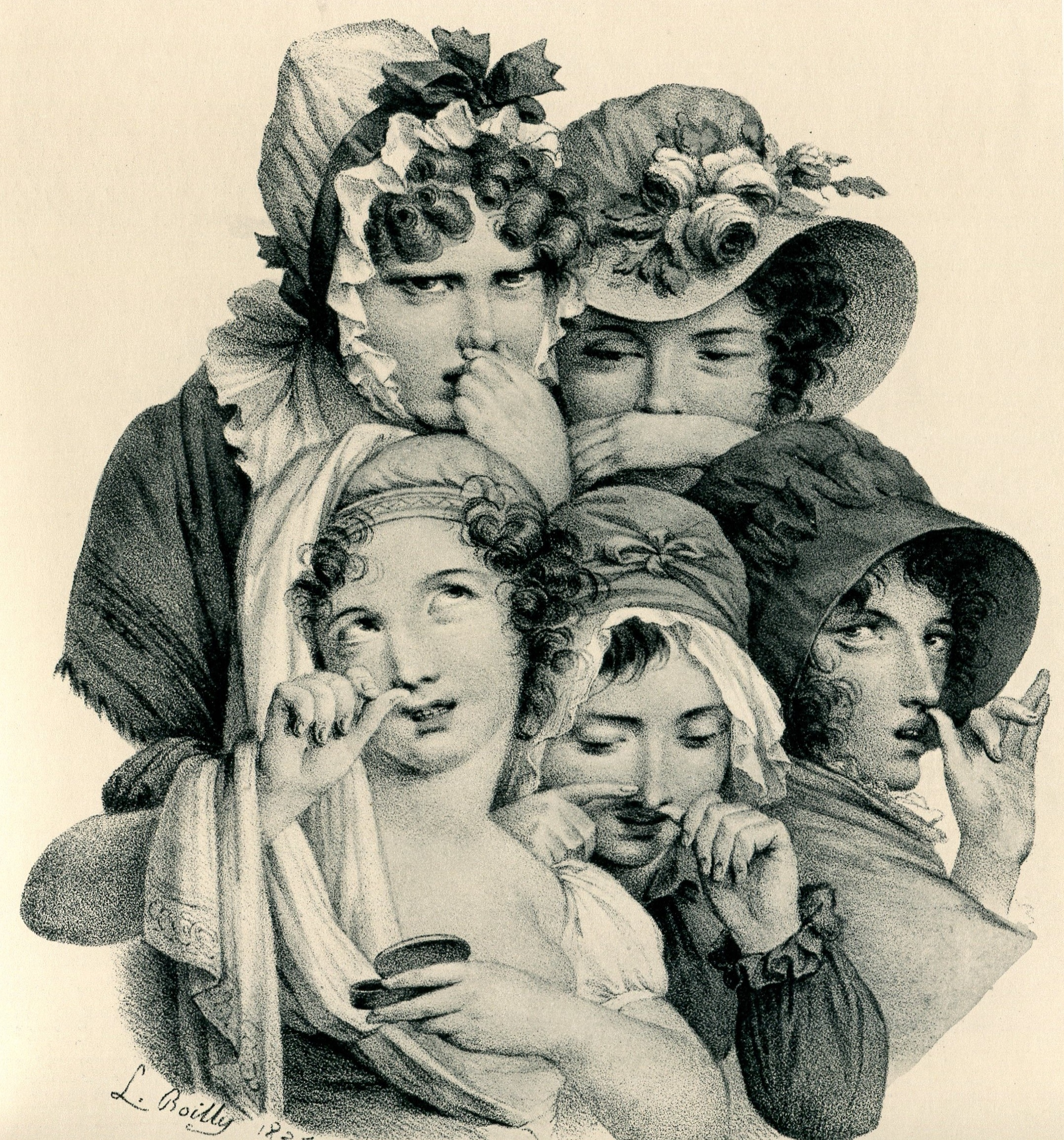 Schnupfende Damen, satirisches Gemälde